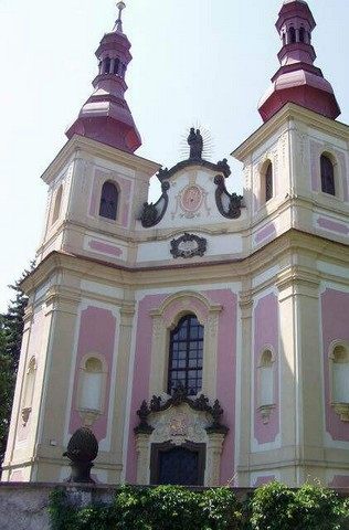 Kostel Panny Marie Utěšitelky, Klášterec nad Ohří.